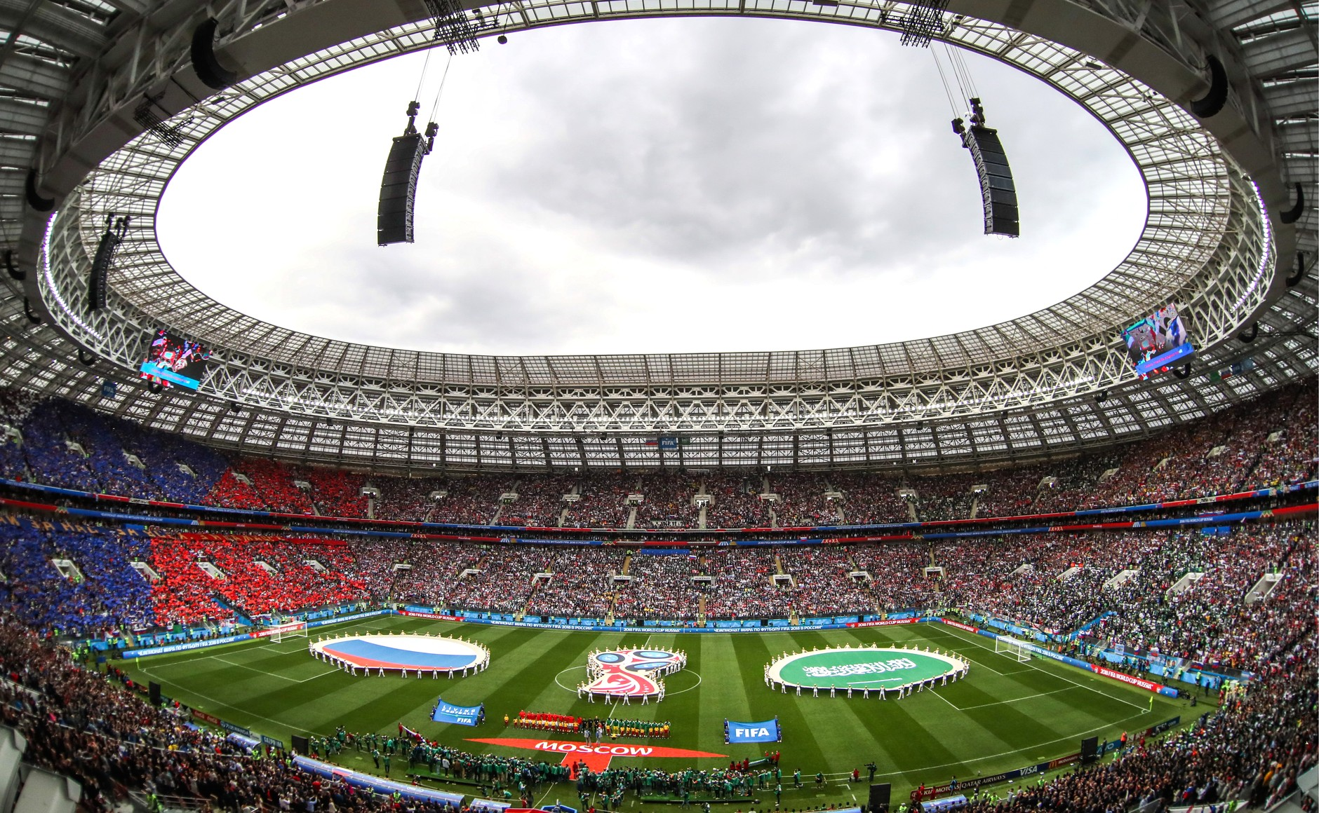 Церемония открытия чемпионата мира по футболу 2018 года